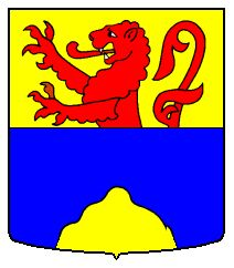 Wappen von Esmonts, Kanton Freiburg, Schweiz